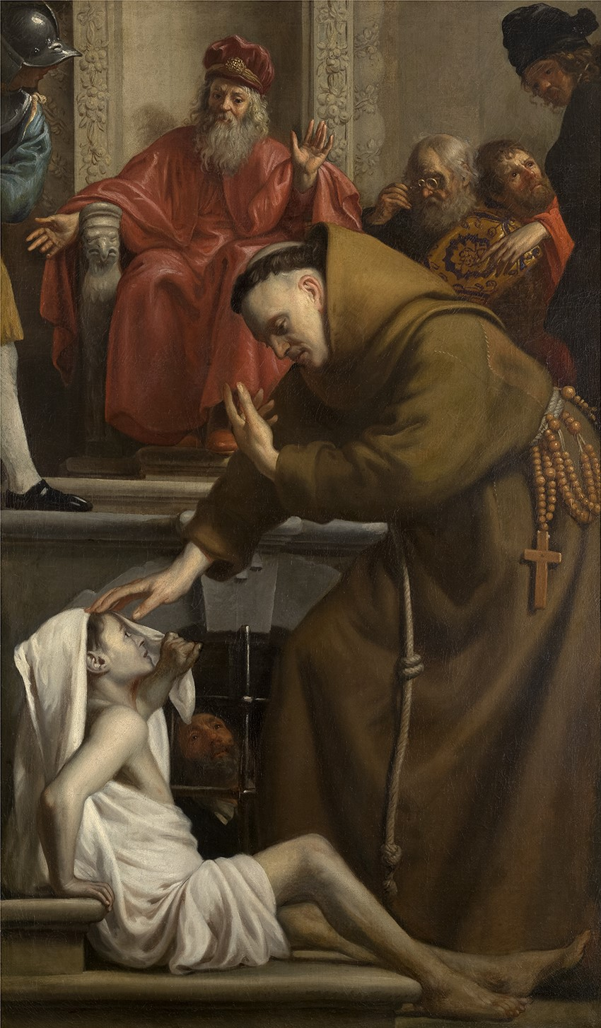 Heilige Antonius wekt een dode terug tot leven (Jacob I van Oost, circa 1640 - circa 1650); collection: Musea Brugge - Groeningemuseum